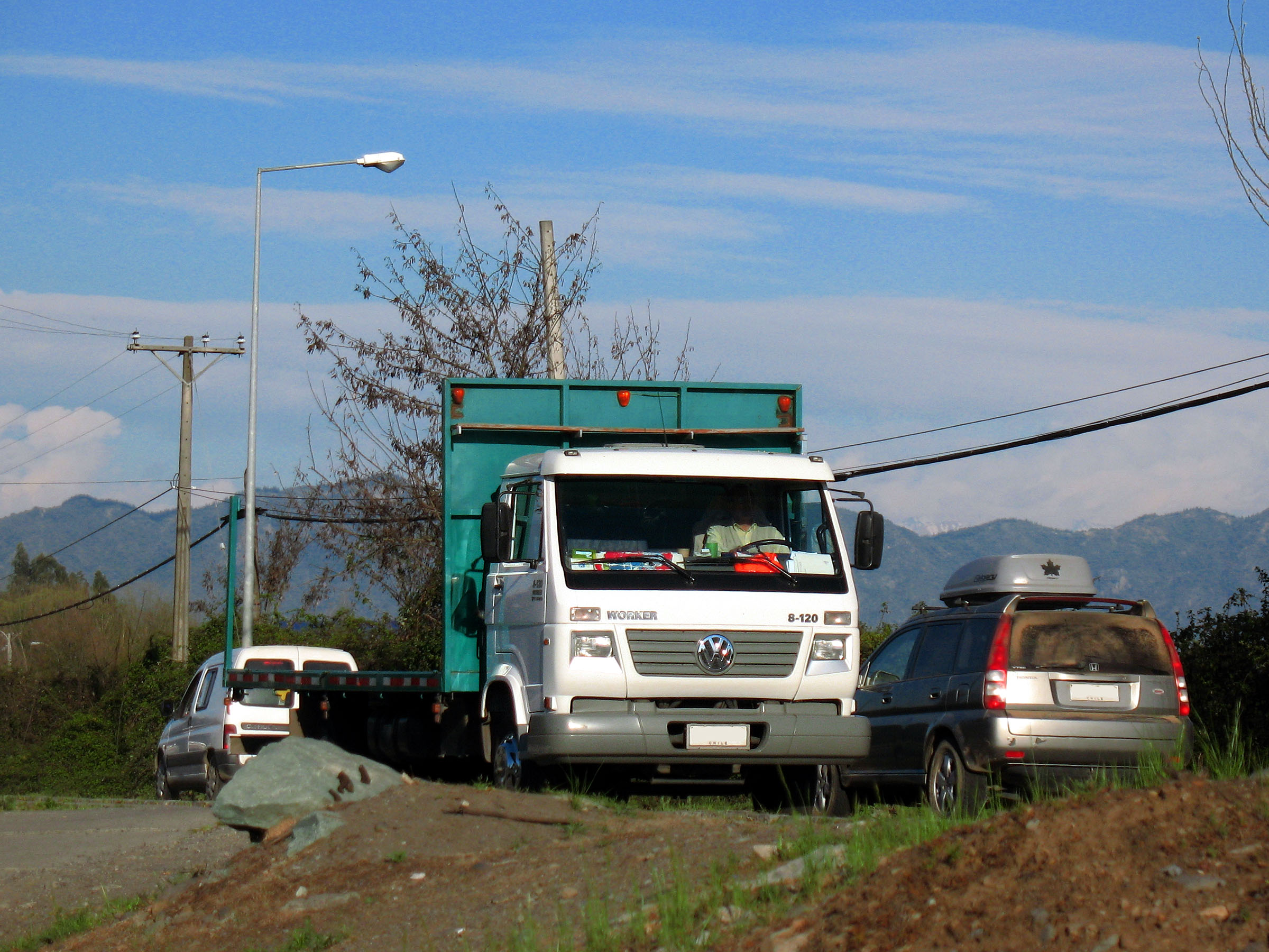 Volkswagen 8-120 Worker 2007